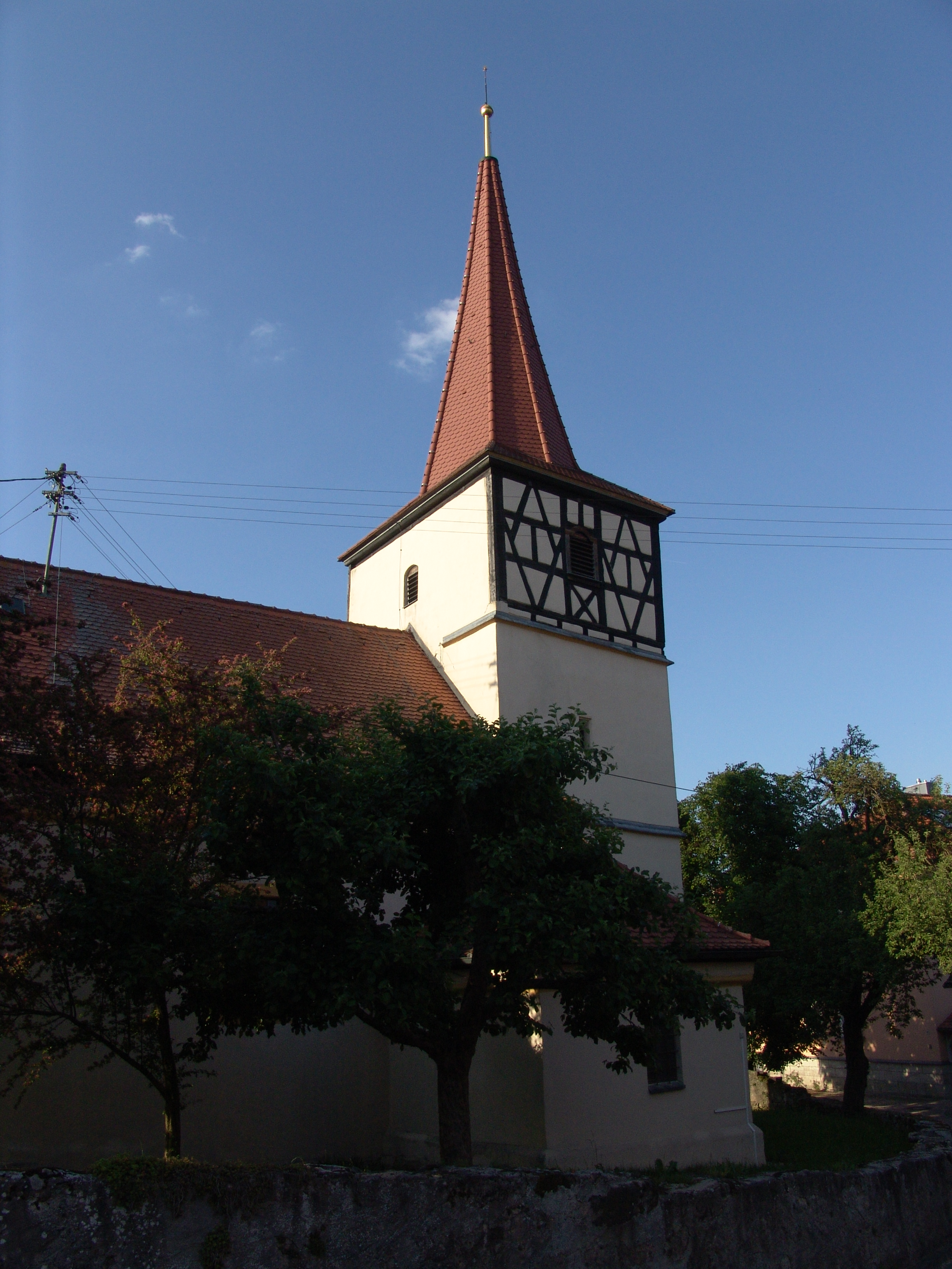 evang.-luth. Marienkirche in Kleinweisach